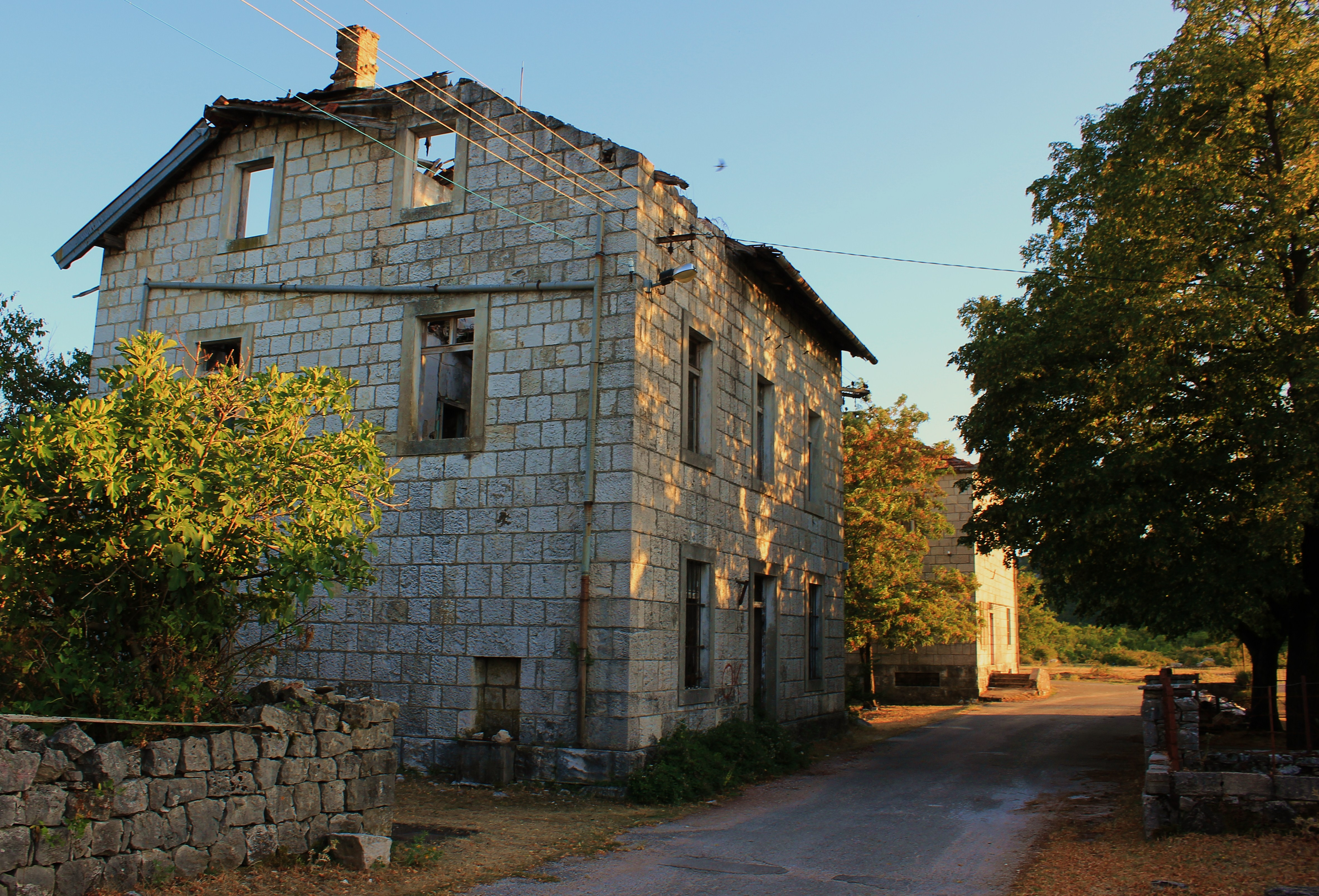 selo Hum